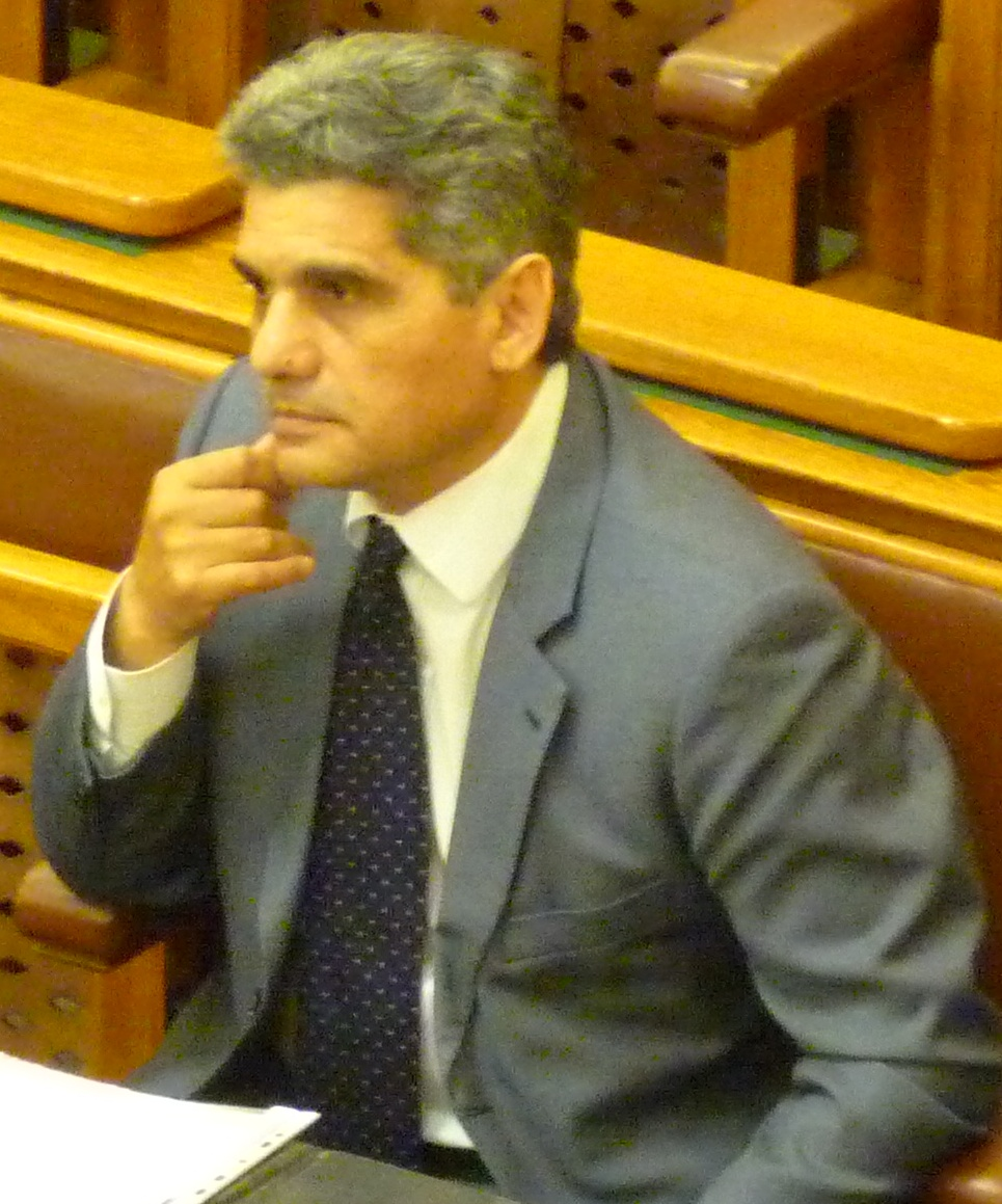 Farkas Flórián magyar politikus.